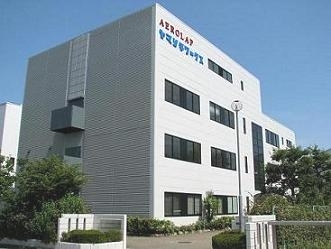 ヤマシタワークス本社